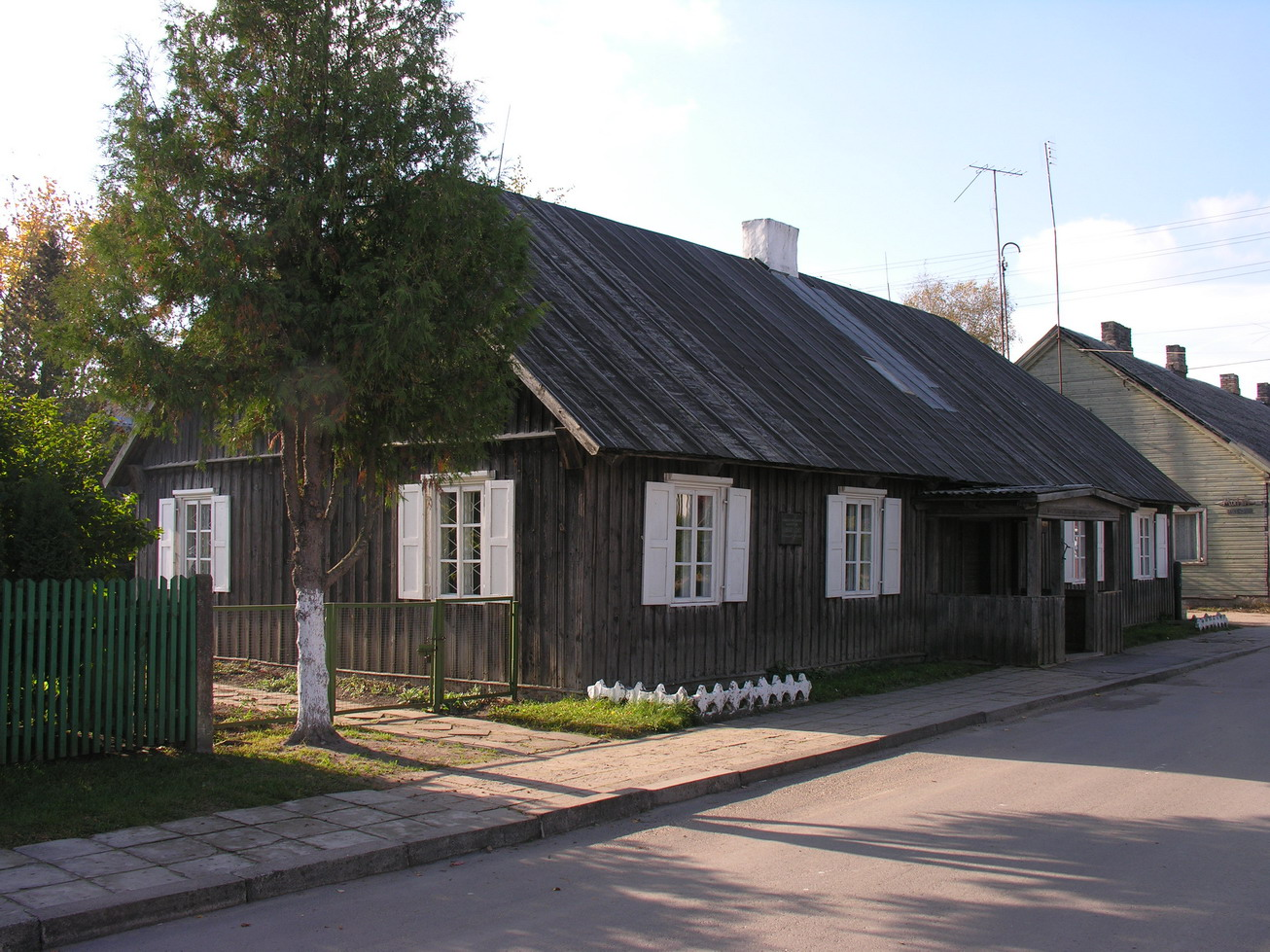 Aviacijos pradininko Lietuvoje Aleksandro Griškevičiaus (1809-1863 m.) muziejus Viekšniuose, Mažeikių raj. Foto: Algirdas, 2005 m. spalio 20 d.